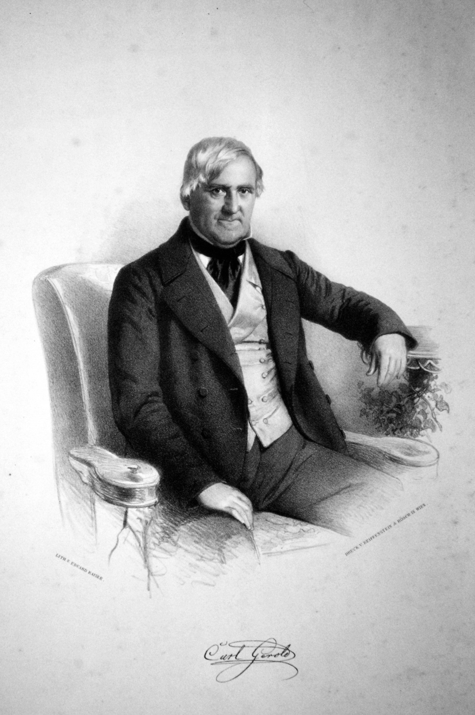 Carl Gerold (1783-1854) österreichischer Buchhändler und Verleger. Lithographie von Eduard Kaiser,1850